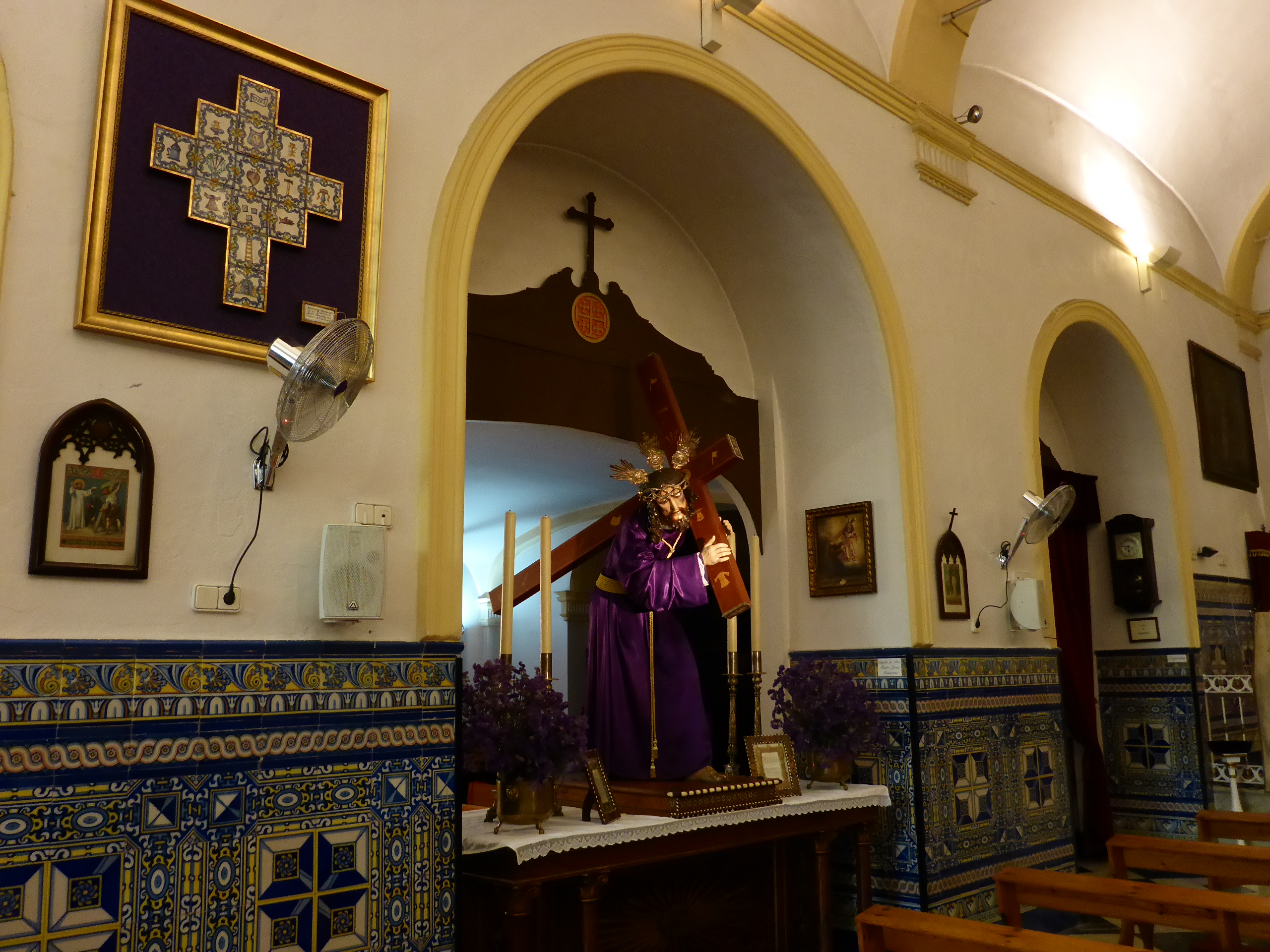 Capilla de San Juan de Letrán (Jerez de la Frontera)